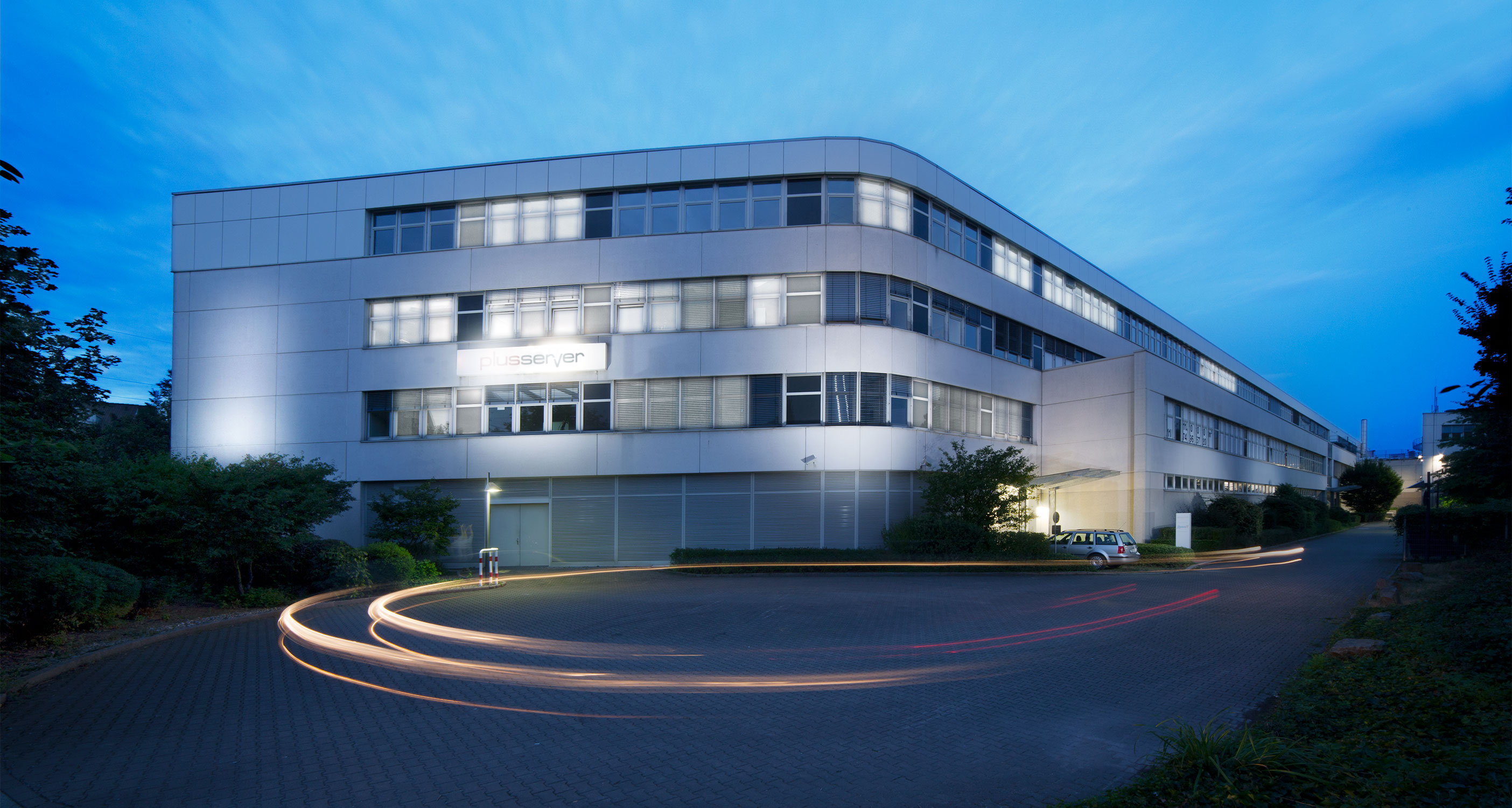 Am Standort Düsseldorf betreibt PlusServer das Rechenzentrum DataHub, das nach IT-Grundschutz durch das Bundesamt für Sicherheit in der Informationstechnik (BSI) zertifiziert ist.